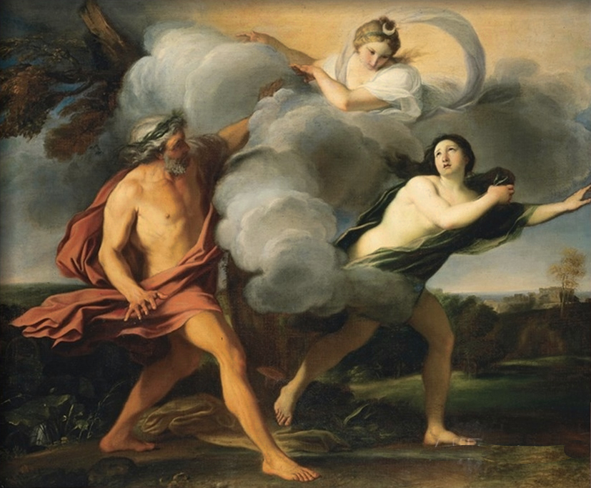 78 × 96 cm